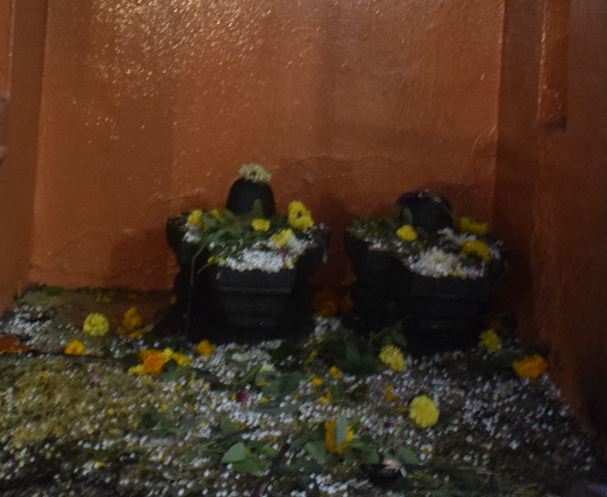 श्री अकलेश्वर लिंग